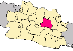 Carte indonésienne